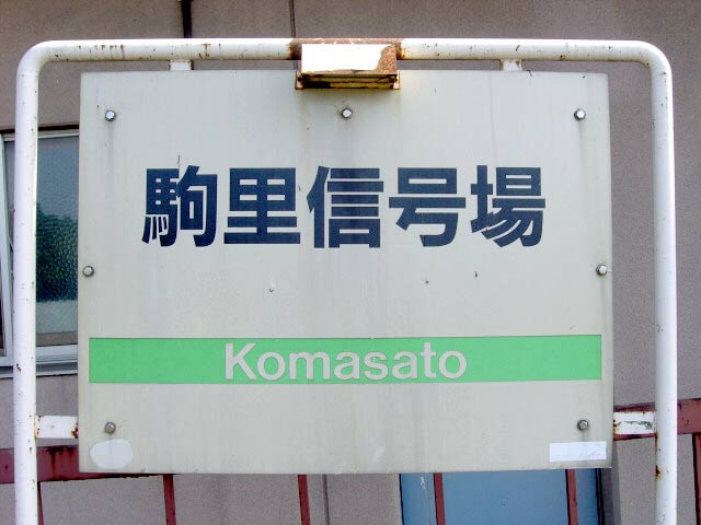 珍しい信号場名看板 撮影場所 駒里信号場 撮影者によるGFDLリリース